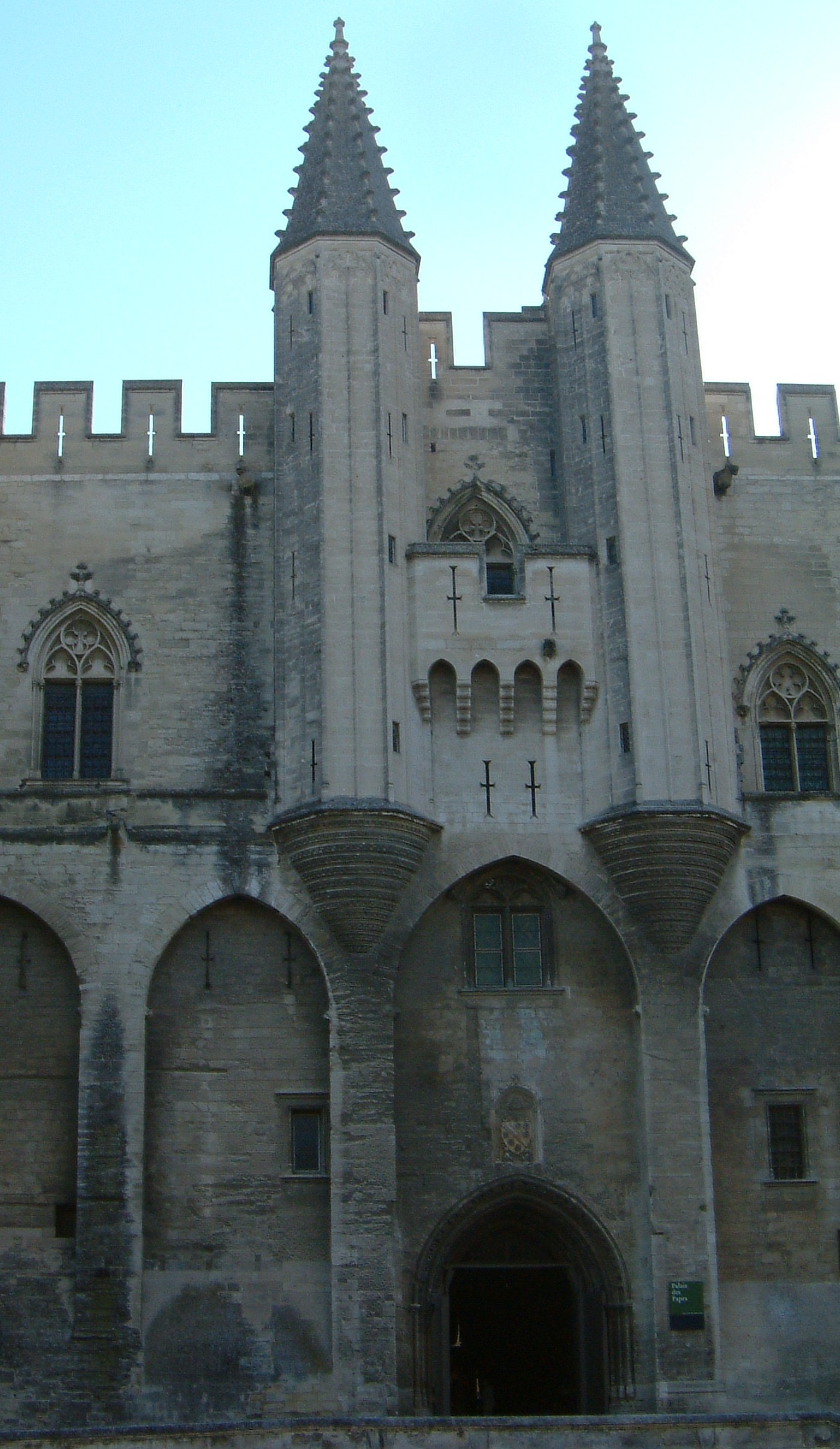 Avignon: Eingang zum Papstpalast. Regierungszeit der Päpste: 1342 bis 1376 (Südfrankreich).